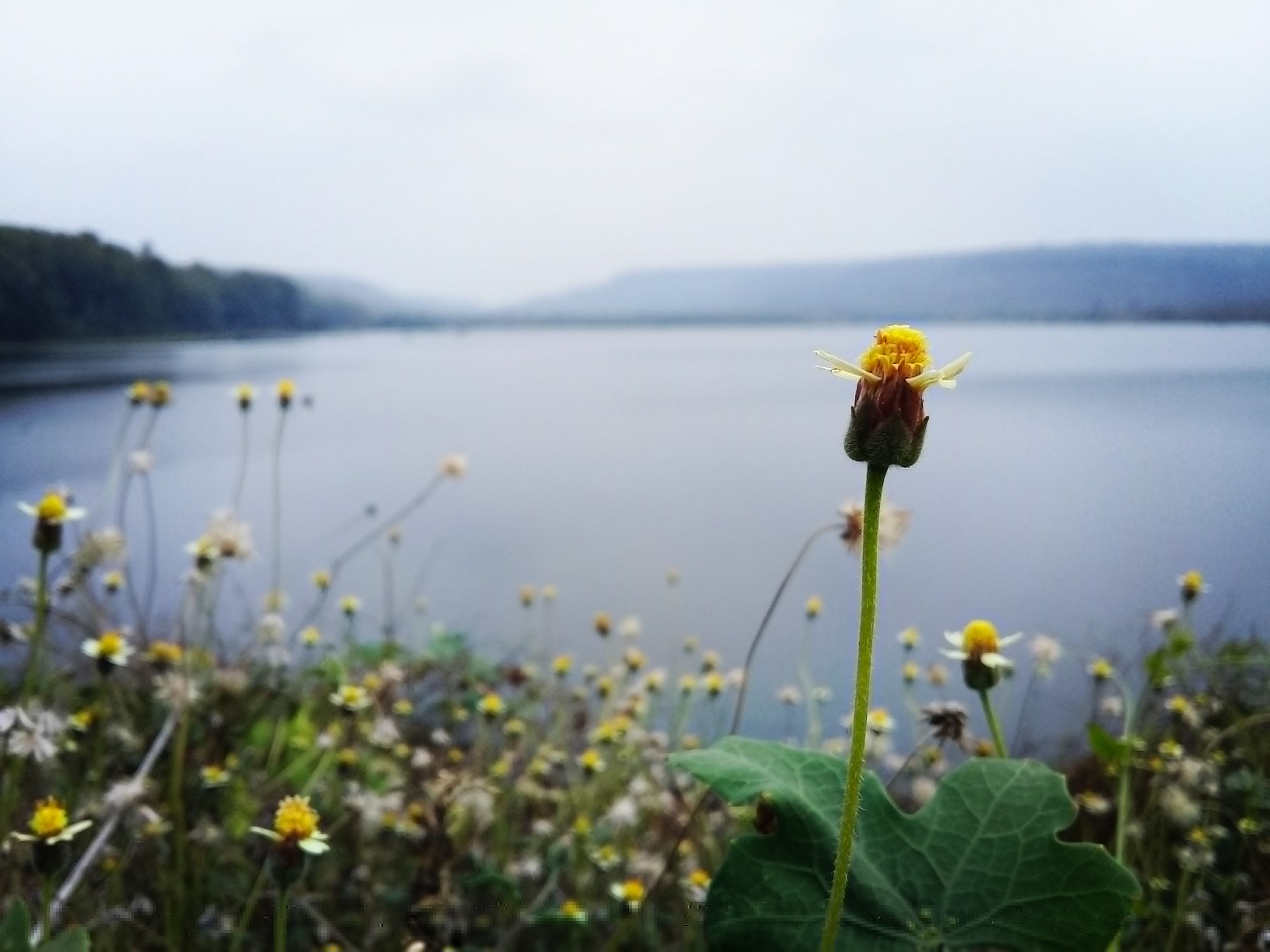 เป็นการพัฒนาพื้นที่แนวชายแดนชายไทย-กัมพูชา บริเวณช่องเขาเมฆาเพื่อใช้น้ำในทางการเกษตรกร โดยได้รับงบประมาณจากการสนับสนุนของรัฐบาลญี่ปุ่น เมื่อ พ.ศ. 2528